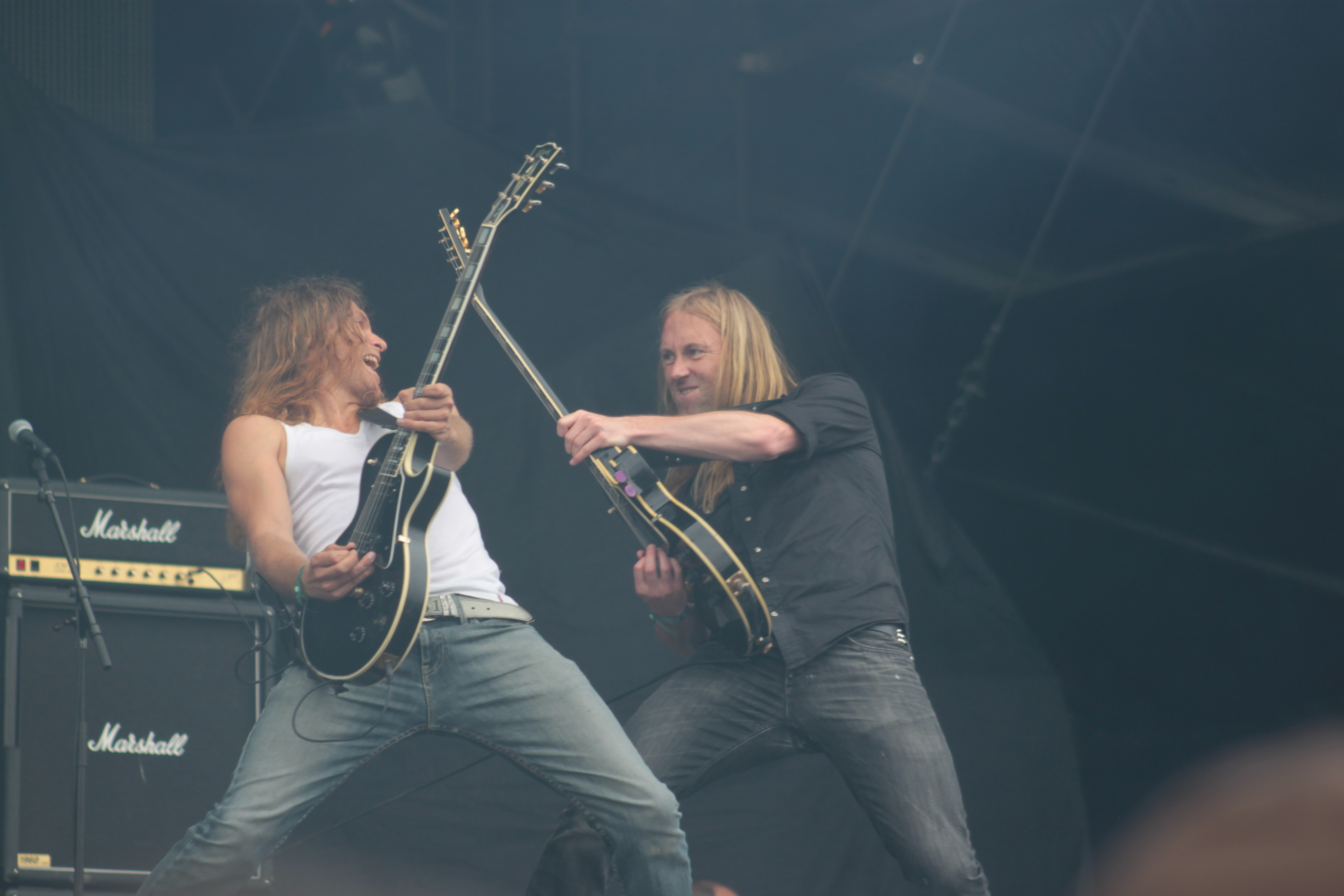 Ice Dale/Arve Isdal, Thomas Tofthagen, Audrey Horne, Helfest 2013, Fr-44-Clisson.